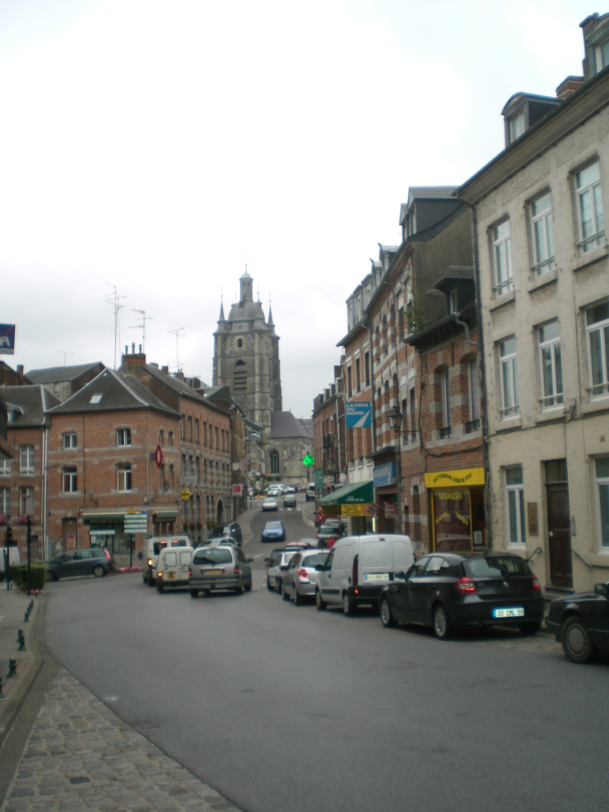 rue d'avesnes sur helpe nord france